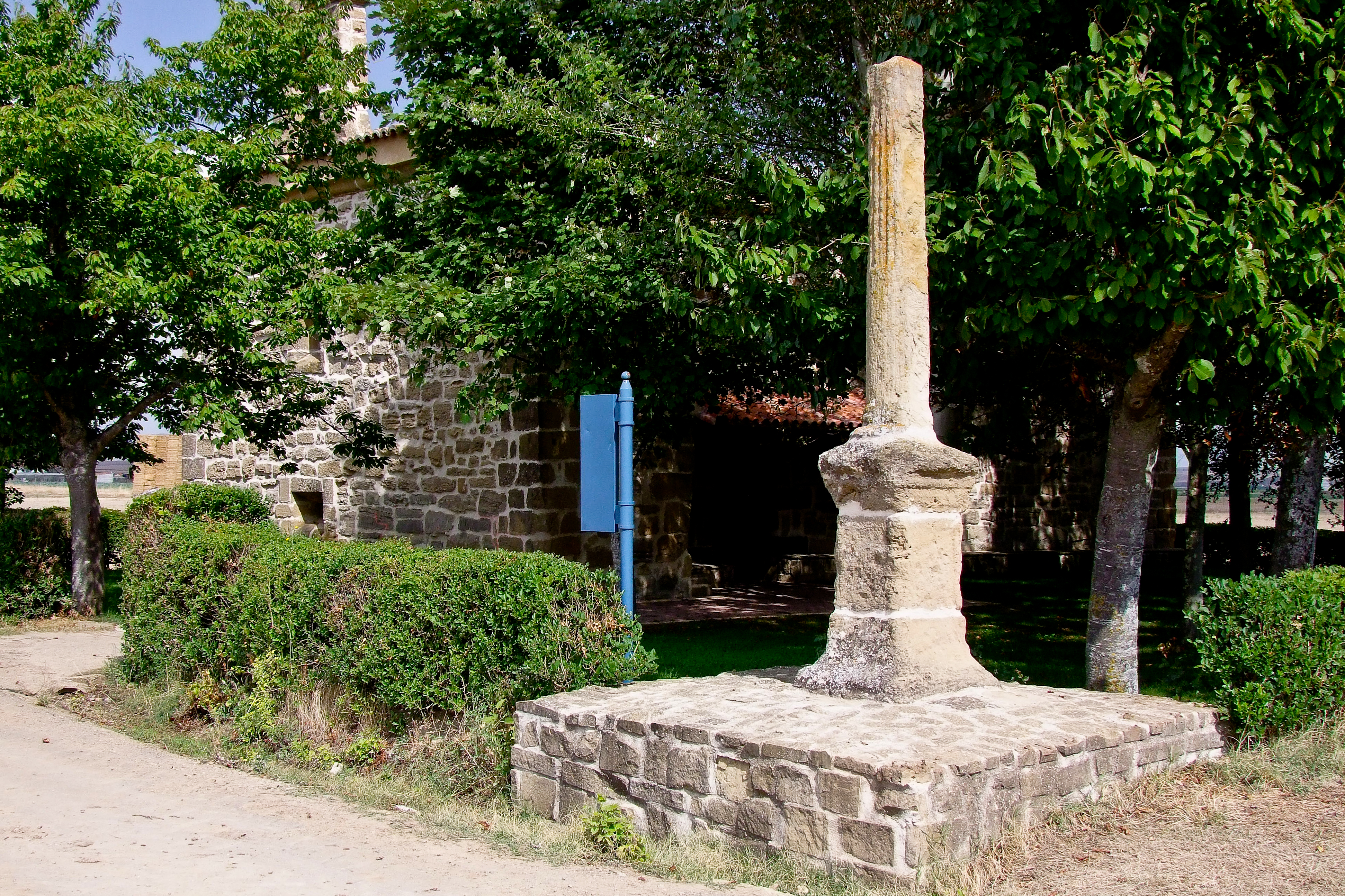 Crucero en la localidad de Leiva, La Rioja - España